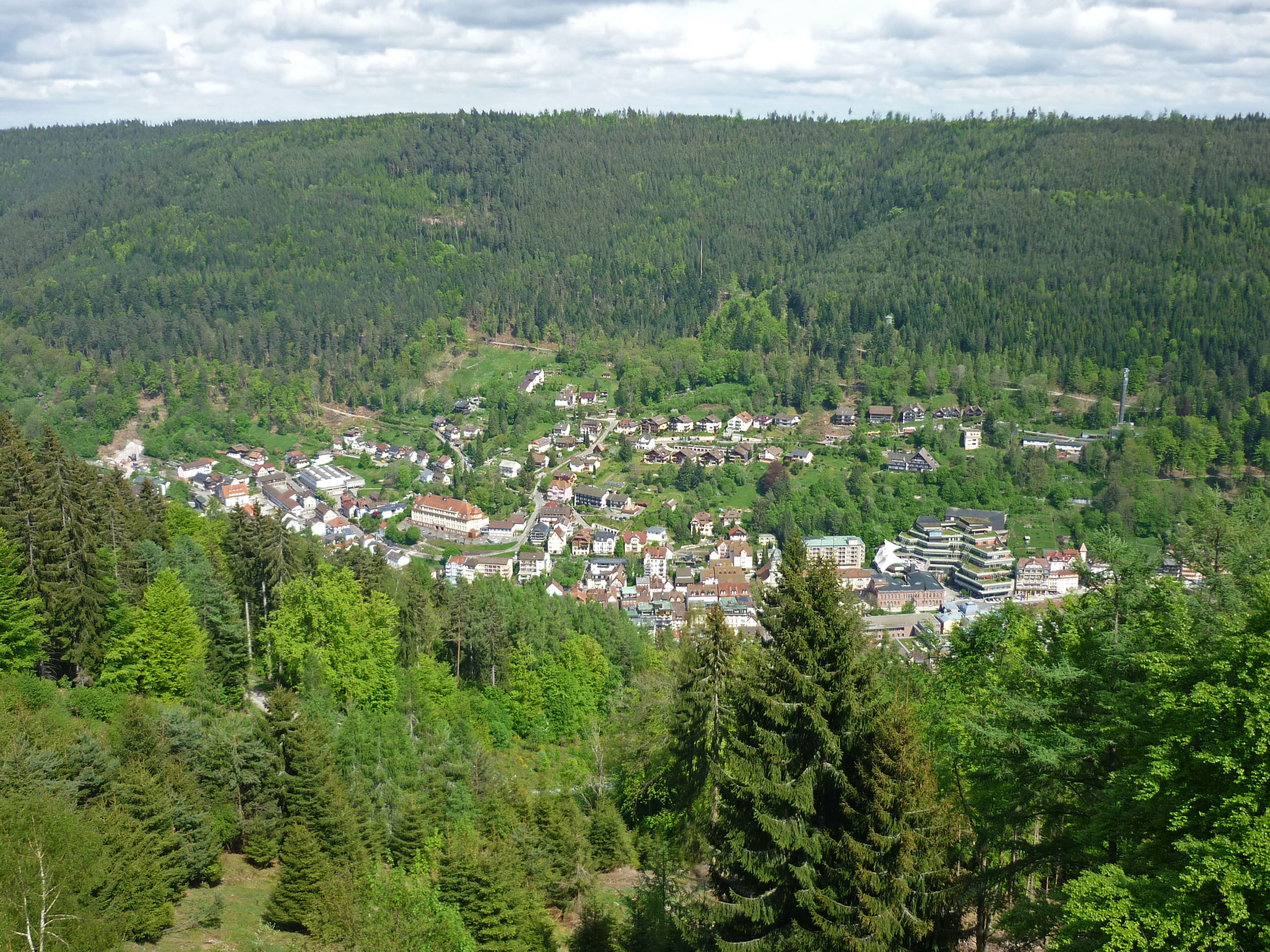 Blick vom Sommerberg nach Bad Wildbad